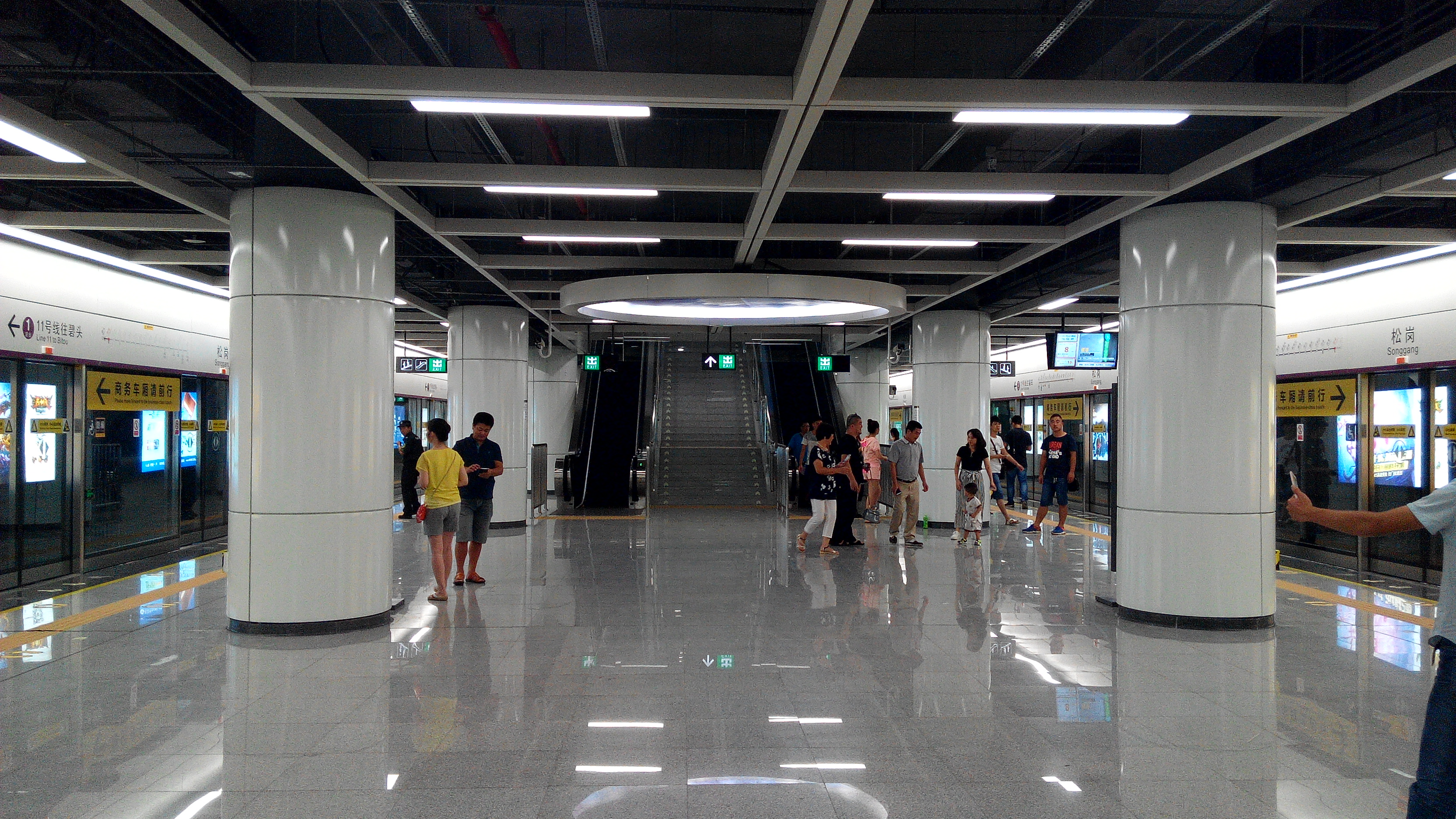 深圳地铁11号线松岗站站台